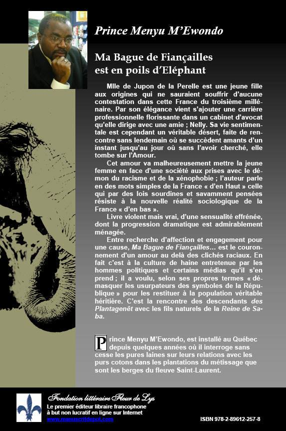 roman de vincent sosthène Fouda paru aux éditions Fleurs de Lys à Québec au Canada